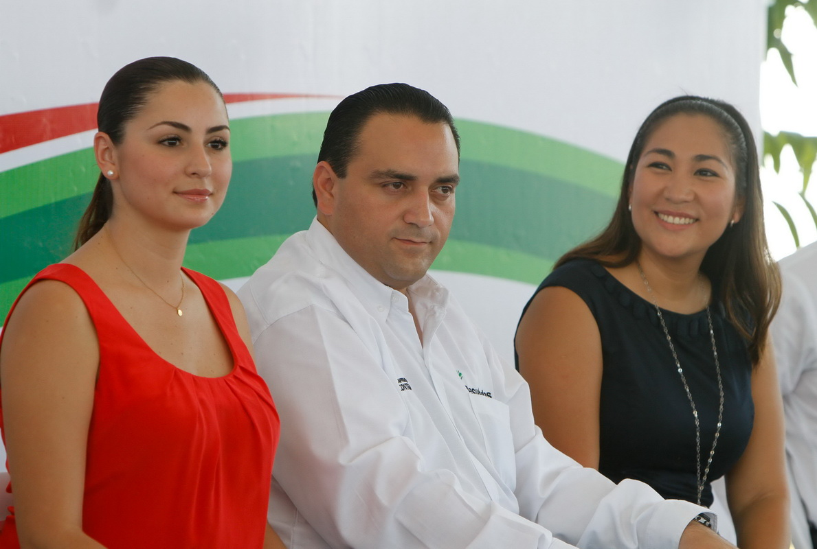 Lizbeth Gamboa Song en evento público con el Gobrernador de Quintana Roo Roberto Borge y su esposa